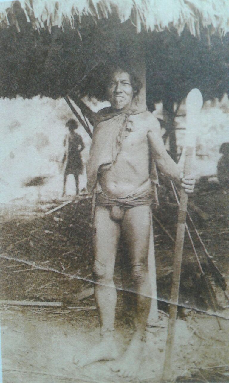 Índio Nelo jovem